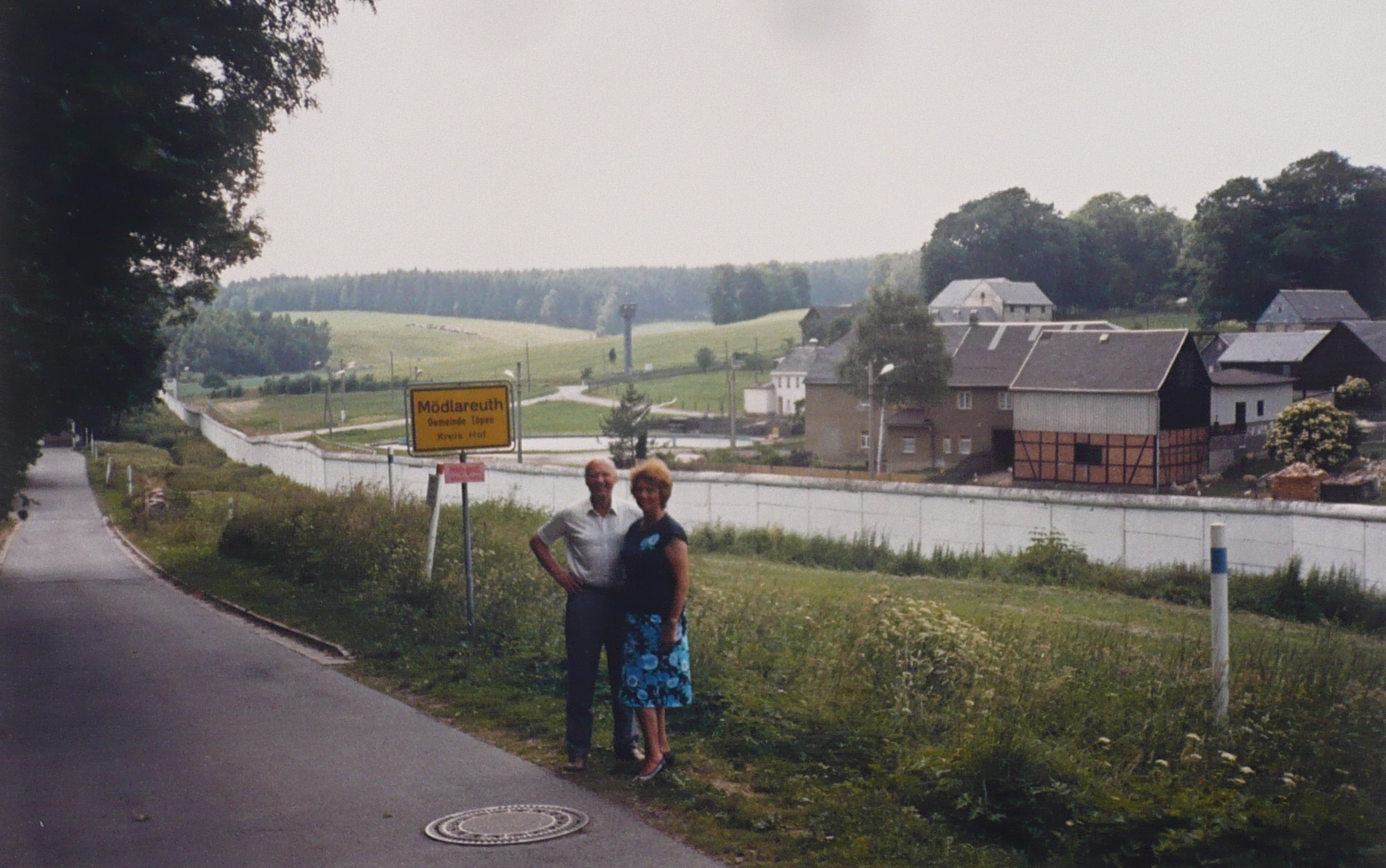 Grenzanlagen in Mödlareuth